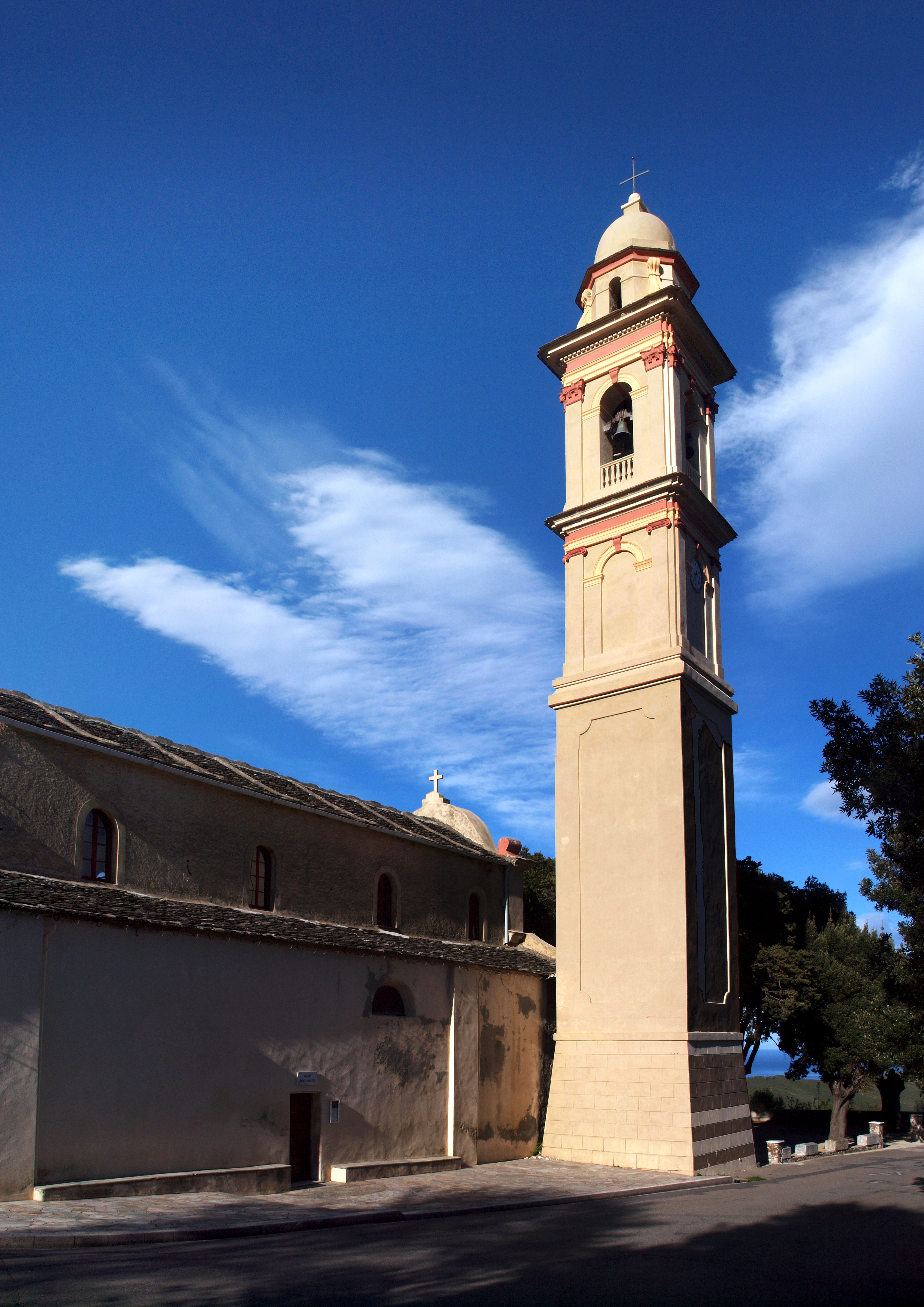 Sisco, Cap Corse (Corse) - Clocher de l'église Saint-Martin à Poggio